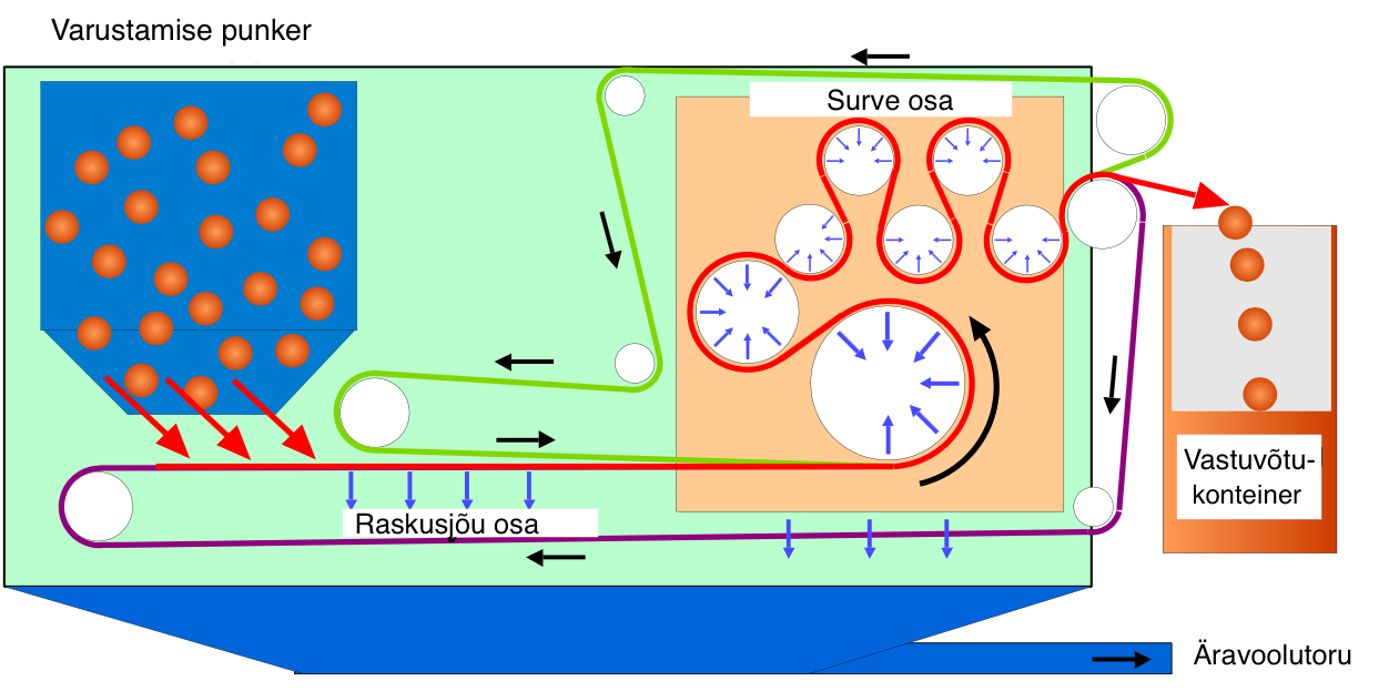 Vöö filtri pressi skeem reoveesette veetustamiseks. Filtraat ekstraheeritakse esialgu raskusega, siis lapi pigistamisega läbi rulli.